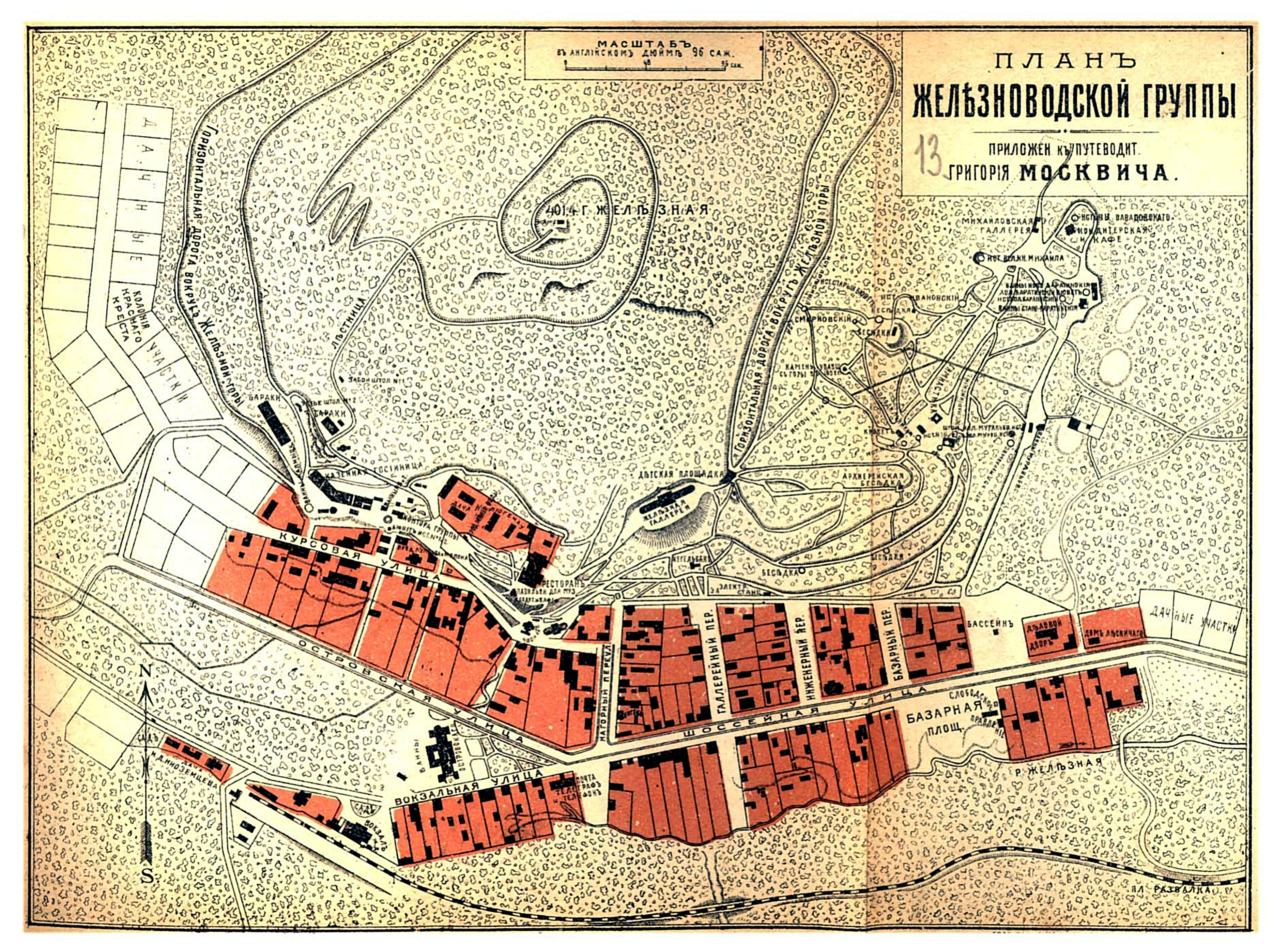 План Железноводска начала XX века из "Иллюстрированного практического путеводителя по Кавказу" Г. Г. Москвича.